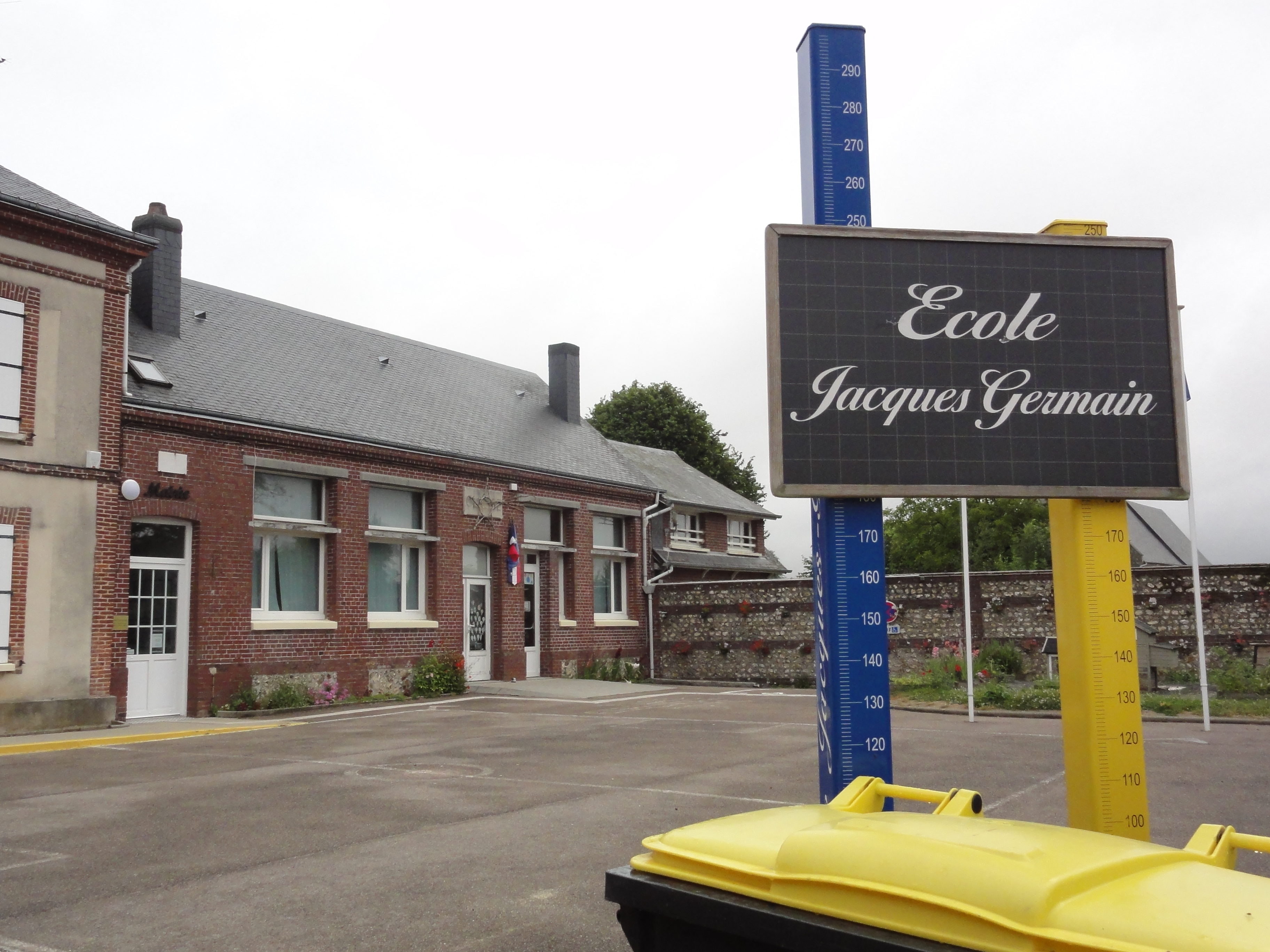 Annouville-Vilmesnil (Seine-Mar.) école